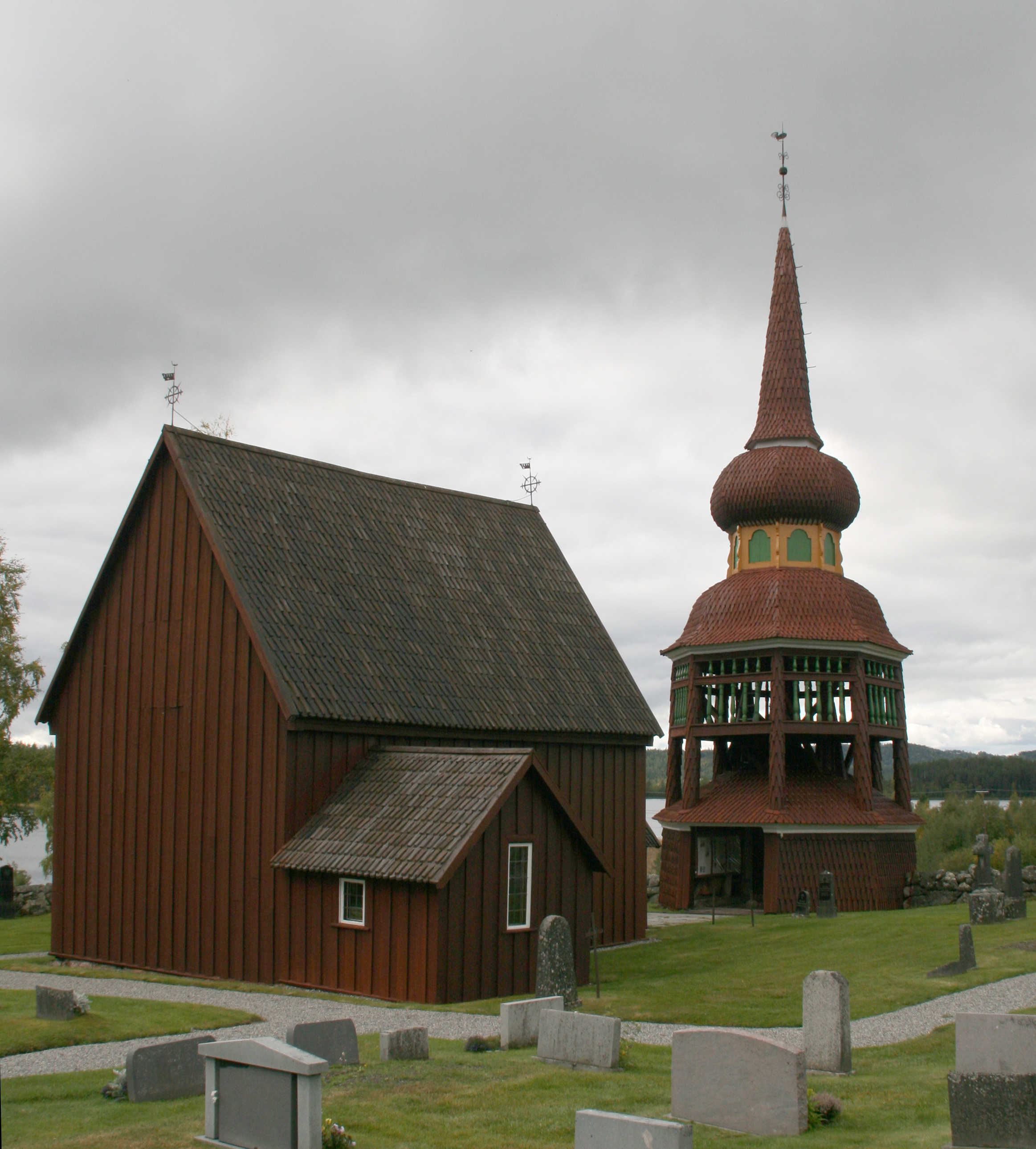 Håsjö gamla kyrka, Hammarstrand, Jämtland